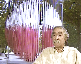 Portrait de Jesús-Rafael Soto